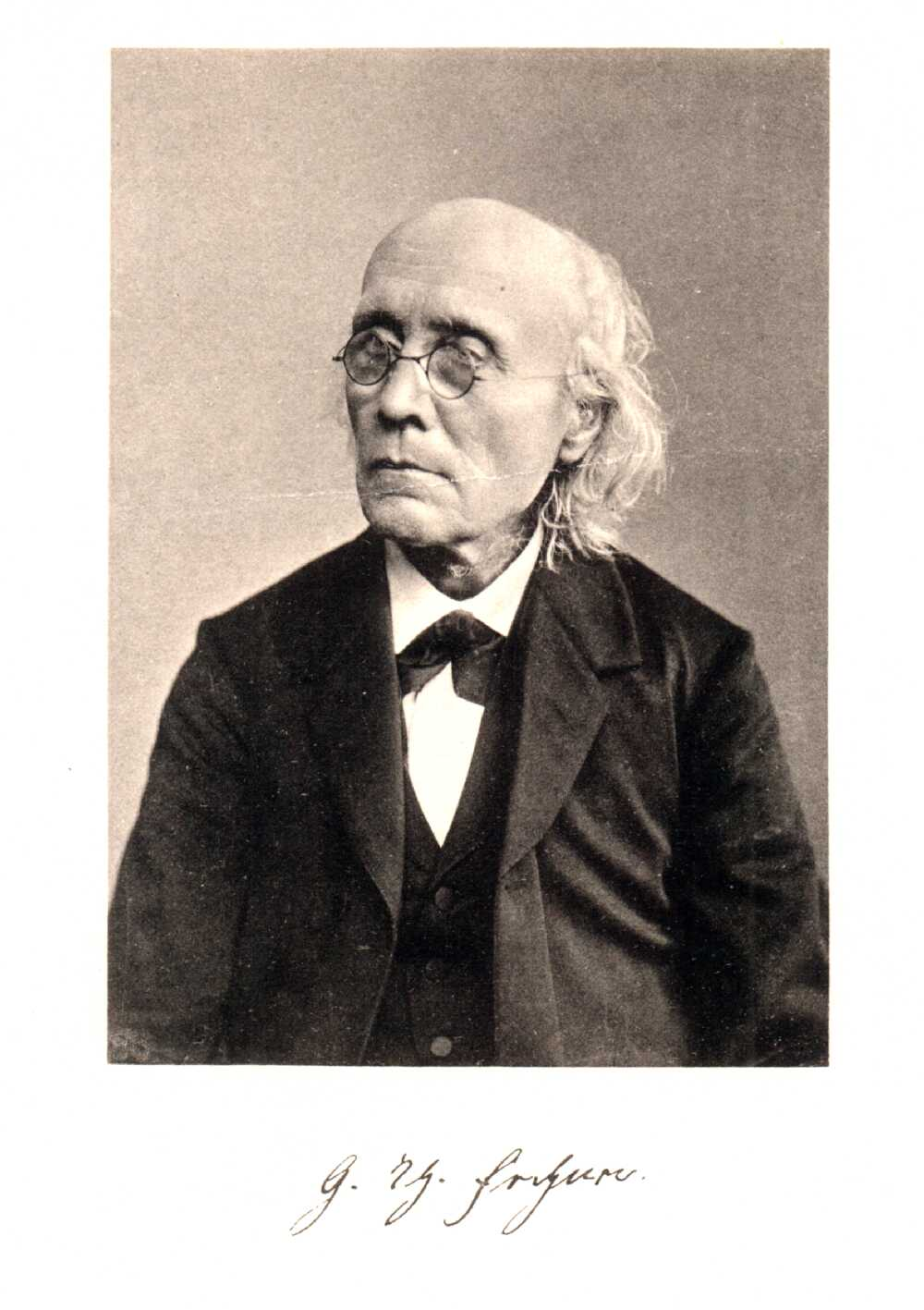 Altersportrait von Gustav Theodor Fechner (1801-1887)